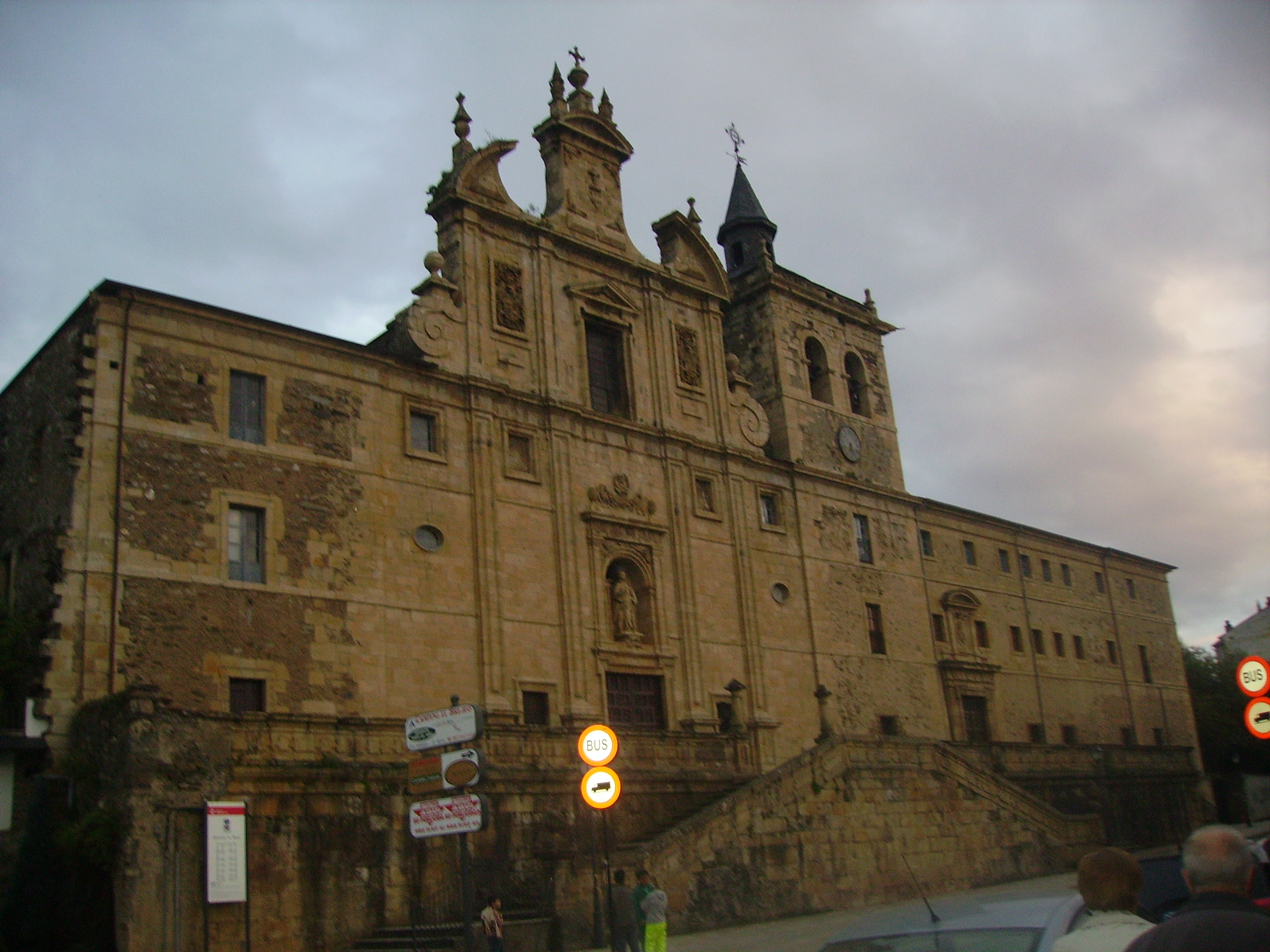 Iglesia de San Nicolás el Real. Antiguo Colegio Jesuita y sede de la Diputación de la Provincia de Villafranca del Bierzo (León, España), hoy en día Convento de los Padres Paúles y hospedería